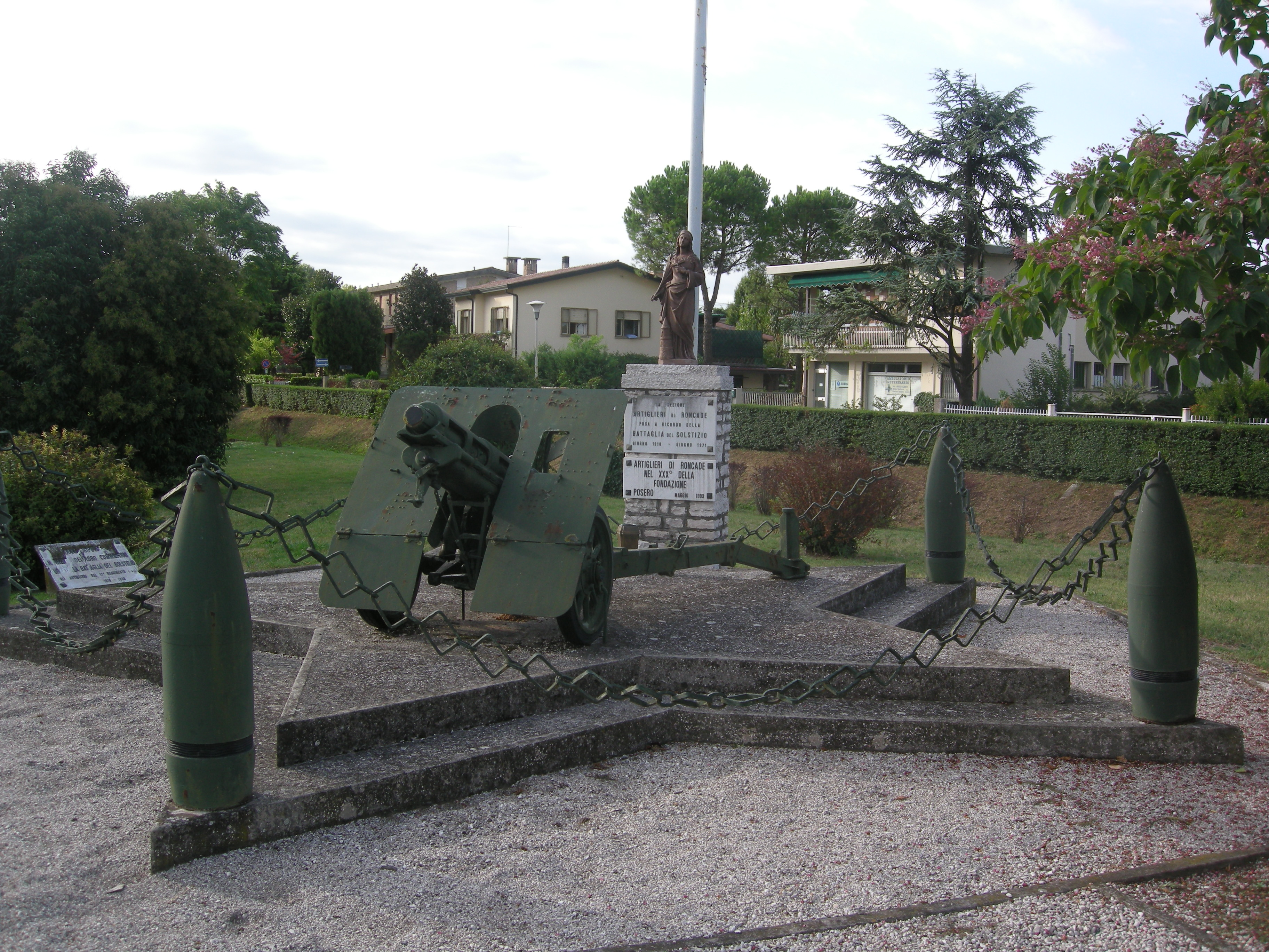 Cervellin, opera propria, monumento battaglia solstizio Roncade TV Italy, lic. GFDL, data 05.09.2009